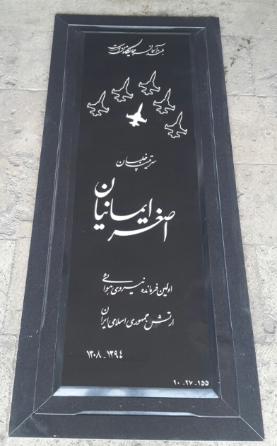 آرامگاه تیمسار سرتیپ خلبان اصغر ایمانیان خلبان تیم آکروجت تاج طلایی